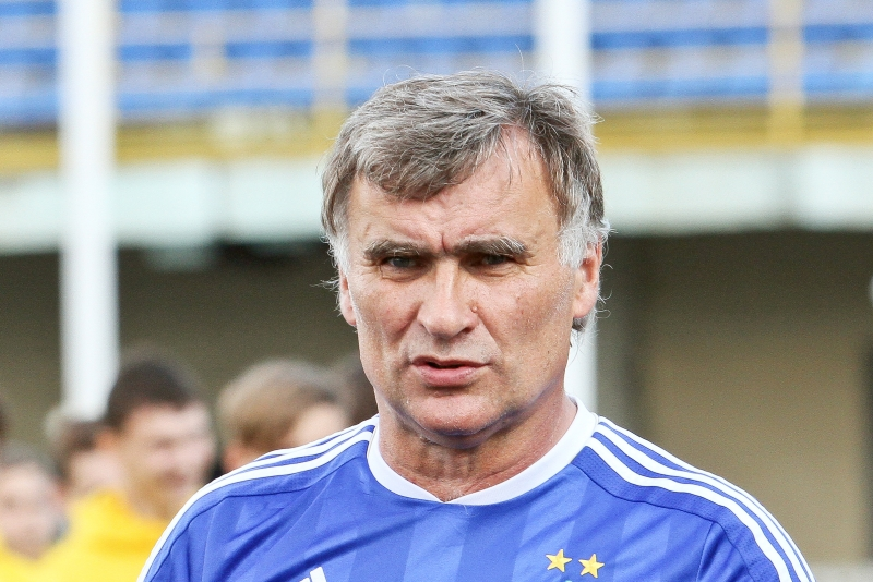 Віктор Хлус — колишній радянський та український футболіст.